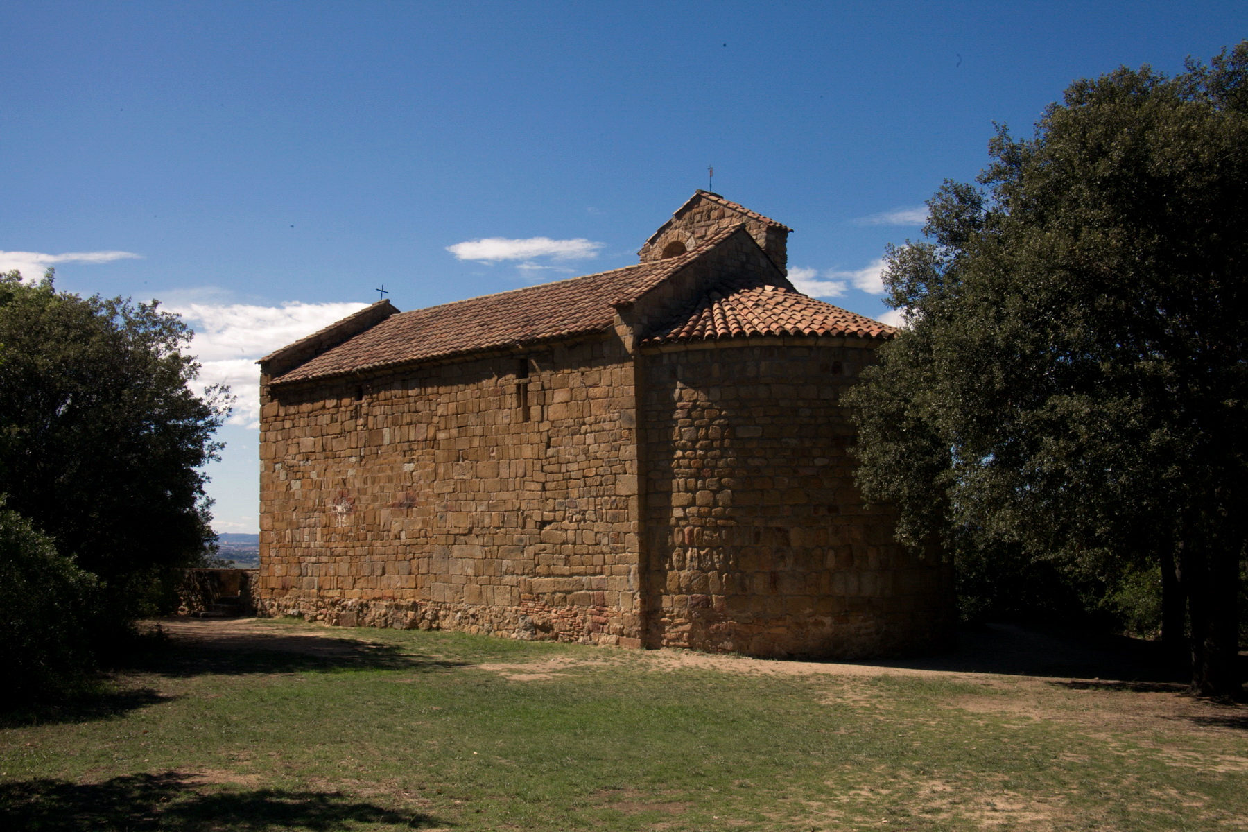 Església de Sant Cebrià de Cabanyes (Sant Fost de Campsentelles)